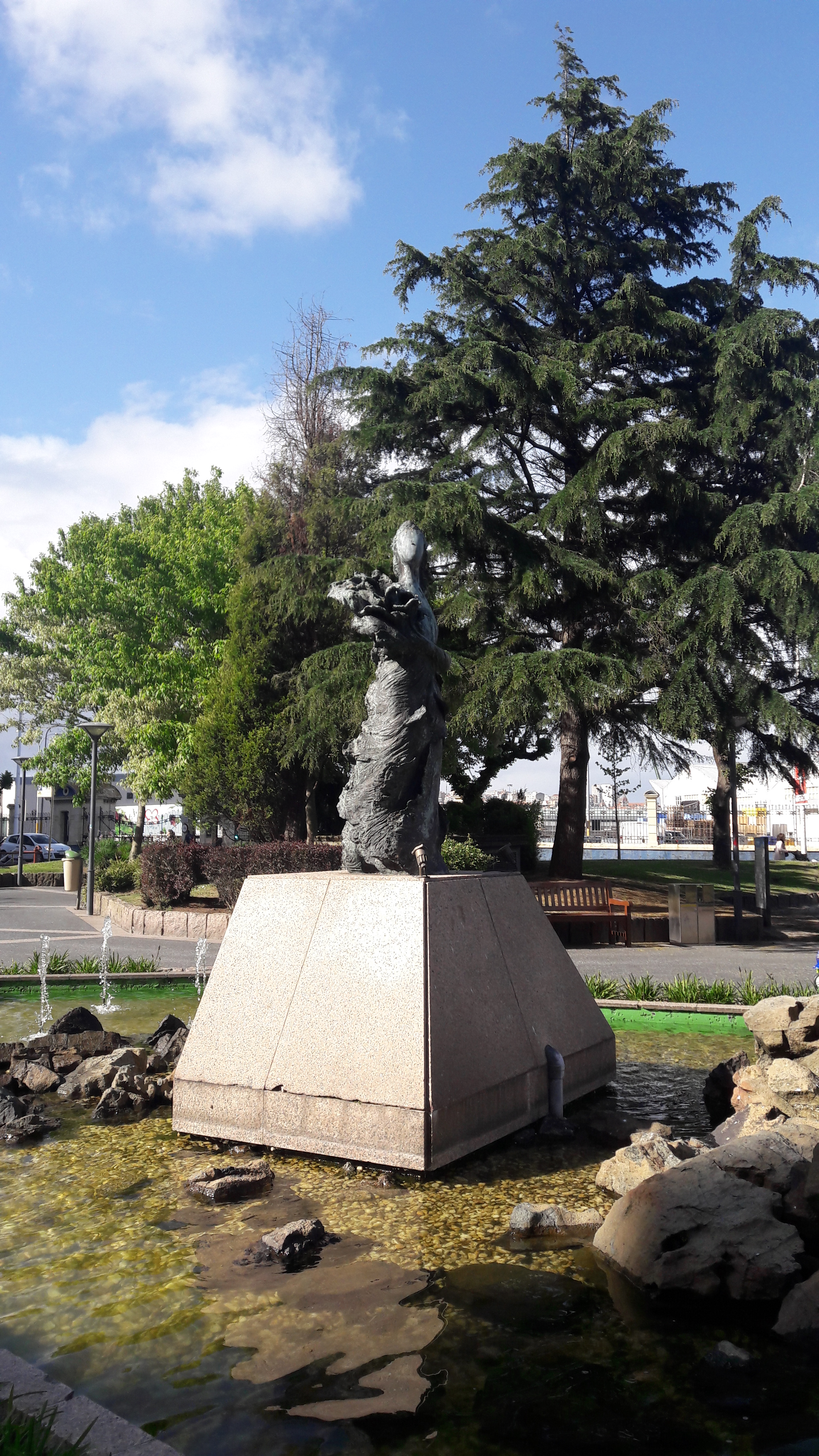 Monumento ás cigarreiras na praza da Palloza da Coruña